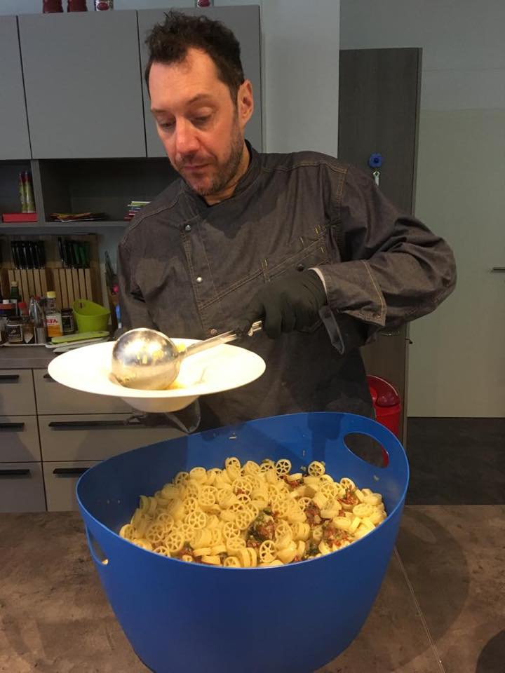 Fernsehkoch Mirko Reeh